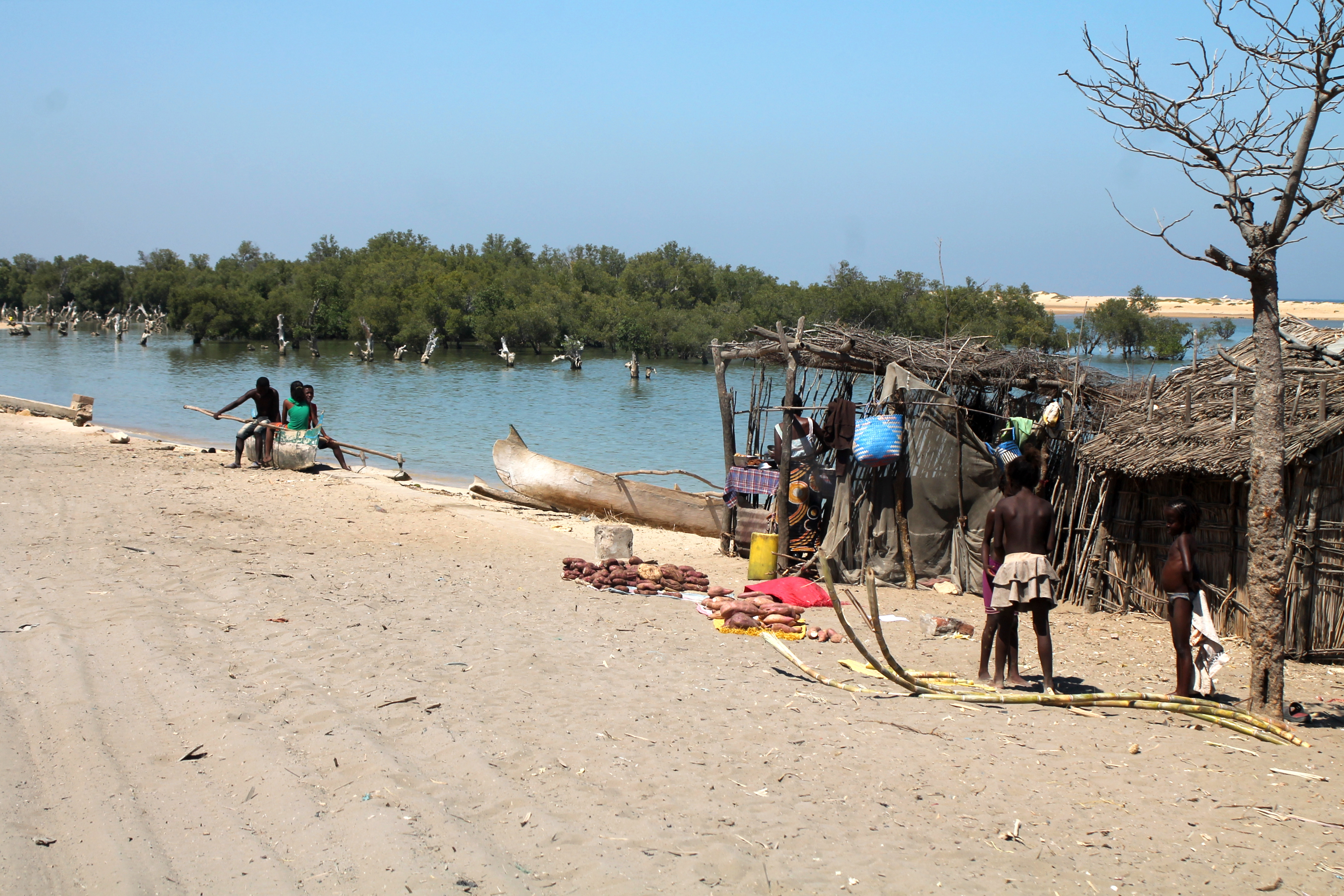 Vezo in Mangily